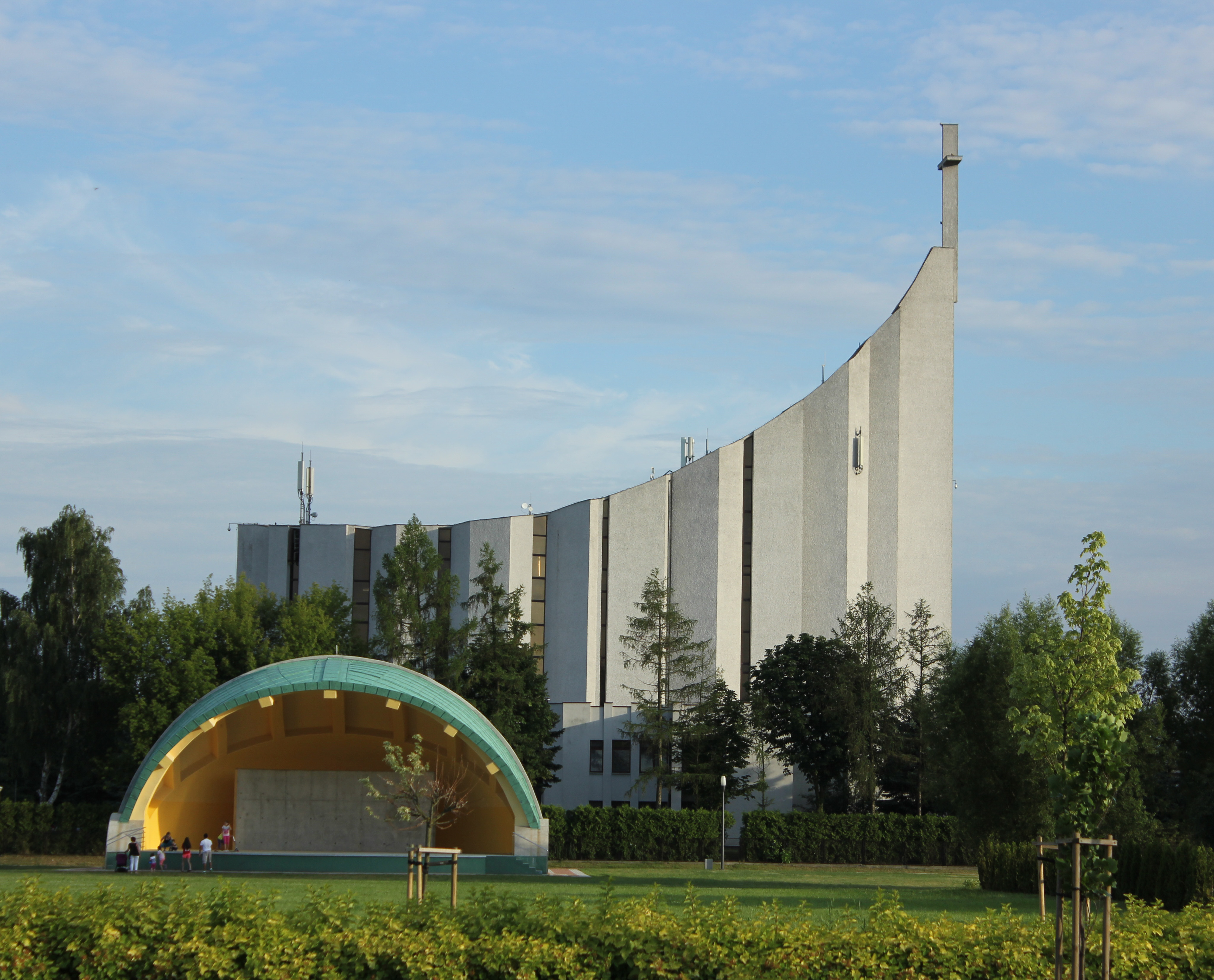 Катедрала „Свето сърце Исусово“ в Жешов, Полша